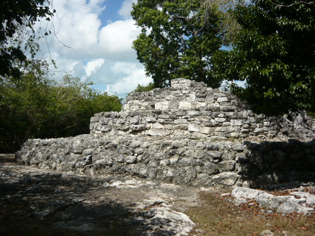 Estructura maya en Plaza Principal, San Gervasio, Cozumel, Quintana Roo, México.